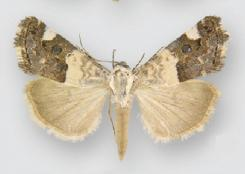 Acontia toddi female